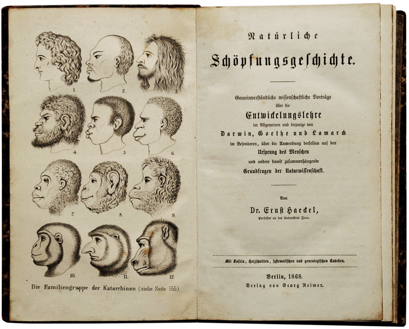 Ernst Haeckel: Natürliche Schöpfungsgeschichte, 1868. Erstdruck